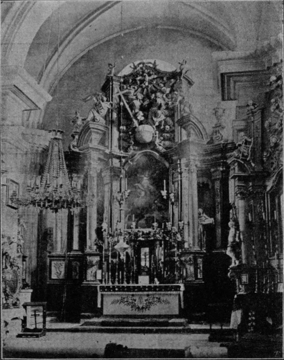 Головний вівтар костелу бернардинів (Бережани, до 1905)